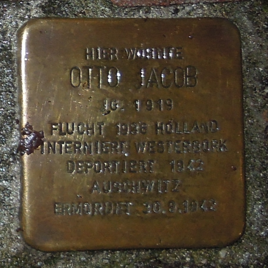 Stolperstein Geldern Gelderstraße 5 Otto Jacob